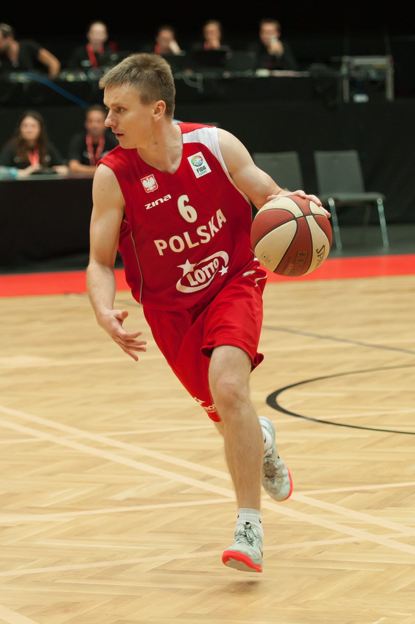 Basketball EM-Qualifikation Österreich gegen Polen Schwechat, 17. August 2014